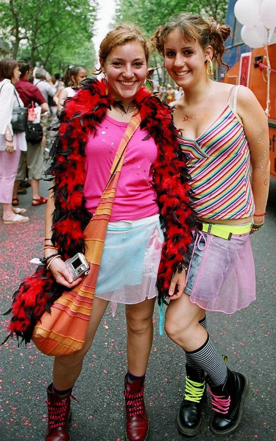 Une couple des lesbiennes à la Gay Pride à Paris en France